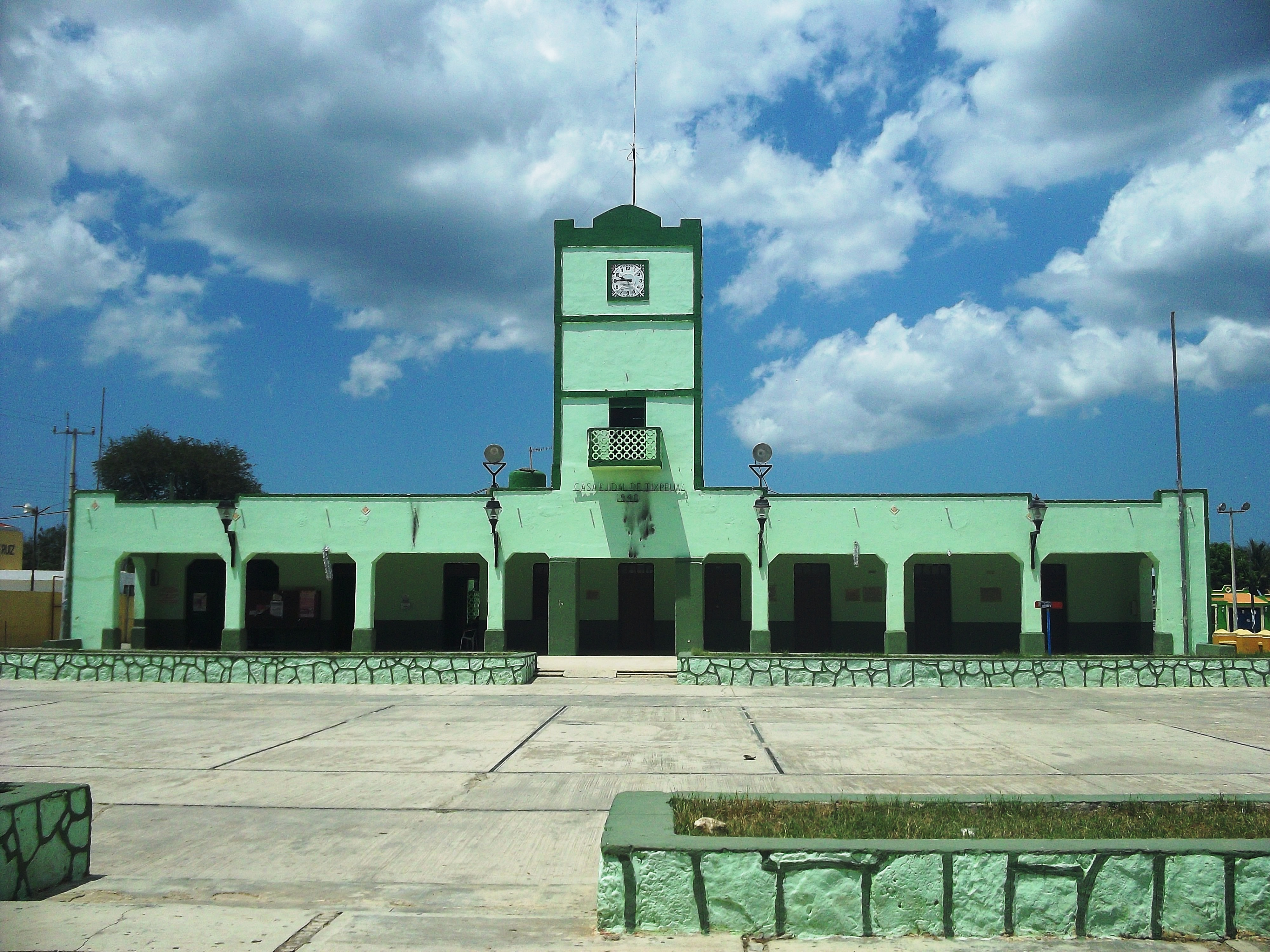 Palacio muncipal de Tixpéhual, Yucatán.